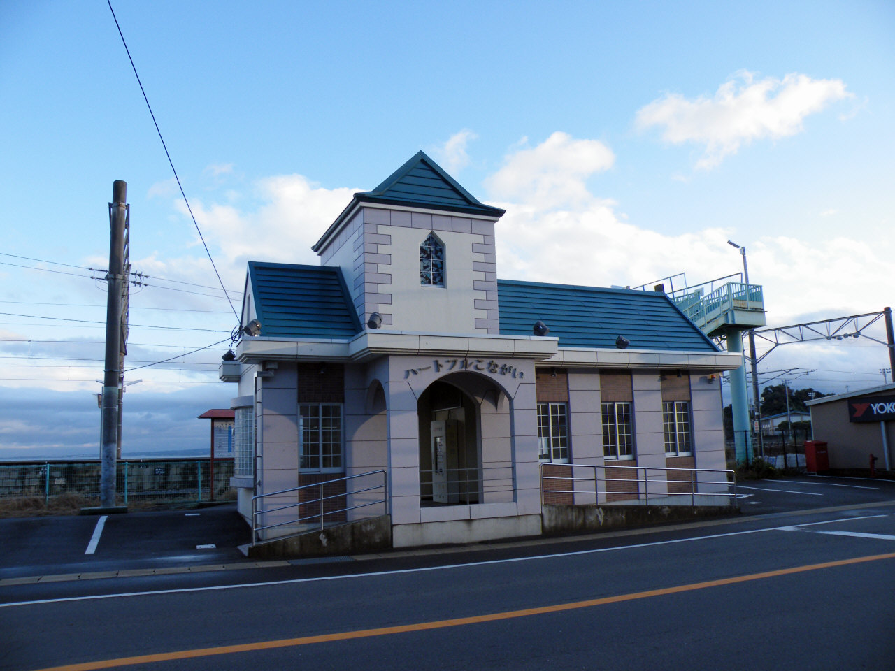 JR九州長崎本線小長井駅